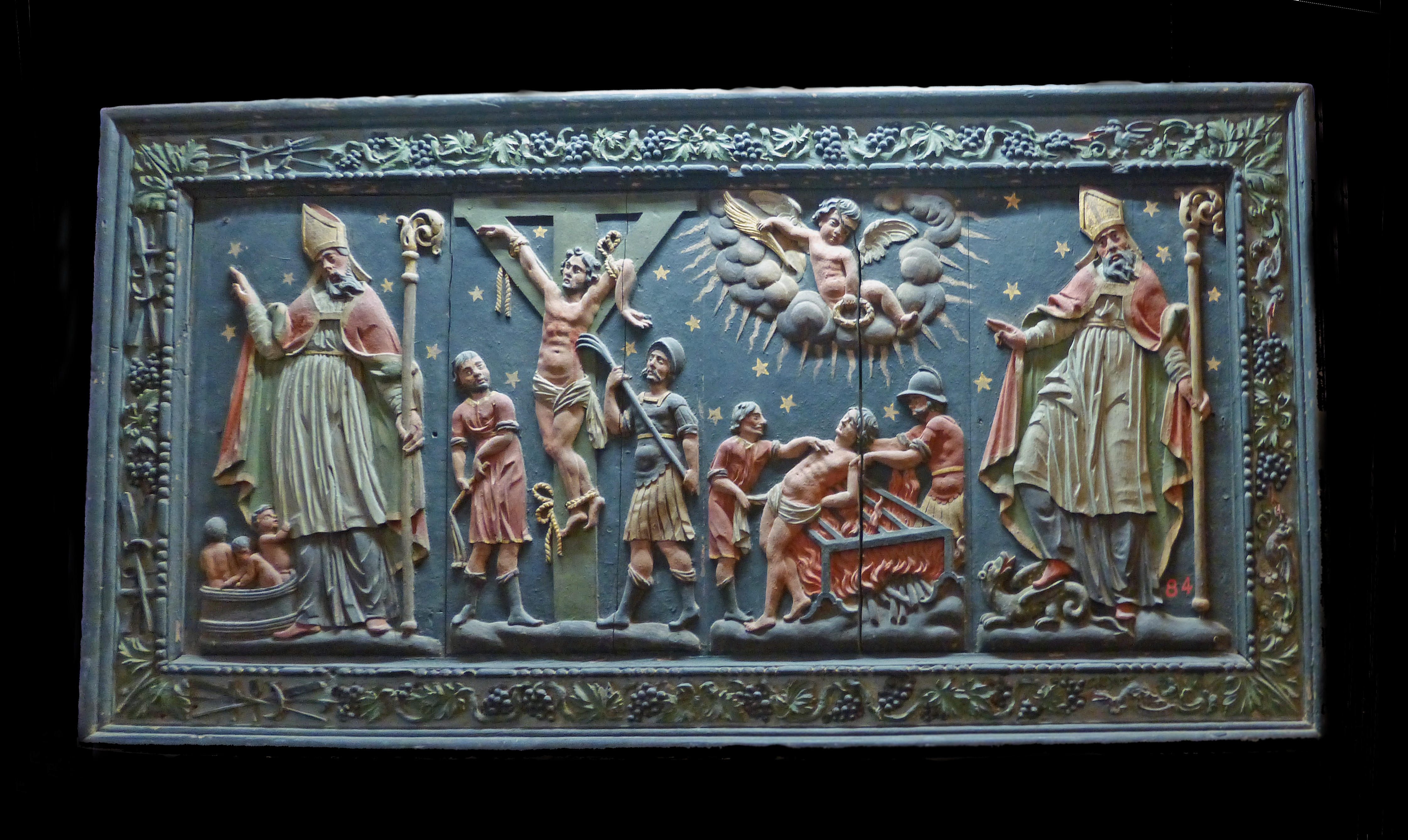 Abbaye Saint-Germain d'Auxerre : devant d'autel en chêne polychrome du XVIIe siècle. De gauche à droite, saint Nicolas, le crucifiement de saint André, le martyre de saint Laurent, saint Germain terrassant l'hérésie pélagienne. Provenance : autel de la chapelle Saint-Nicolas de l'église de Vermenton, déposé en 1753. N° d'inventaire : 871.6